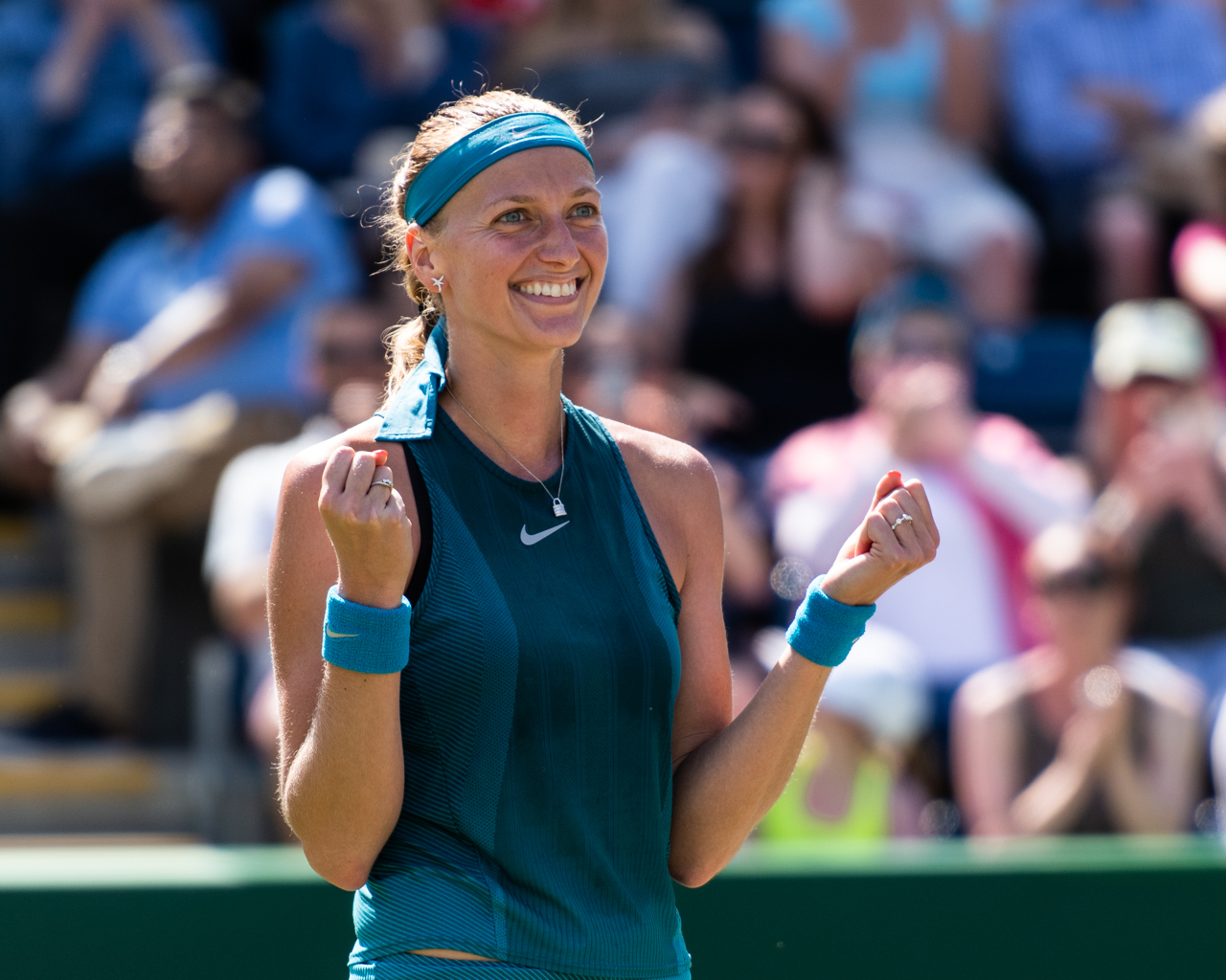 Petra Kvitova